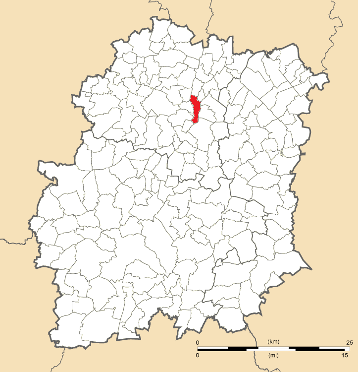 Carte de position de Longpont-sur-Orge en Essonne (91)